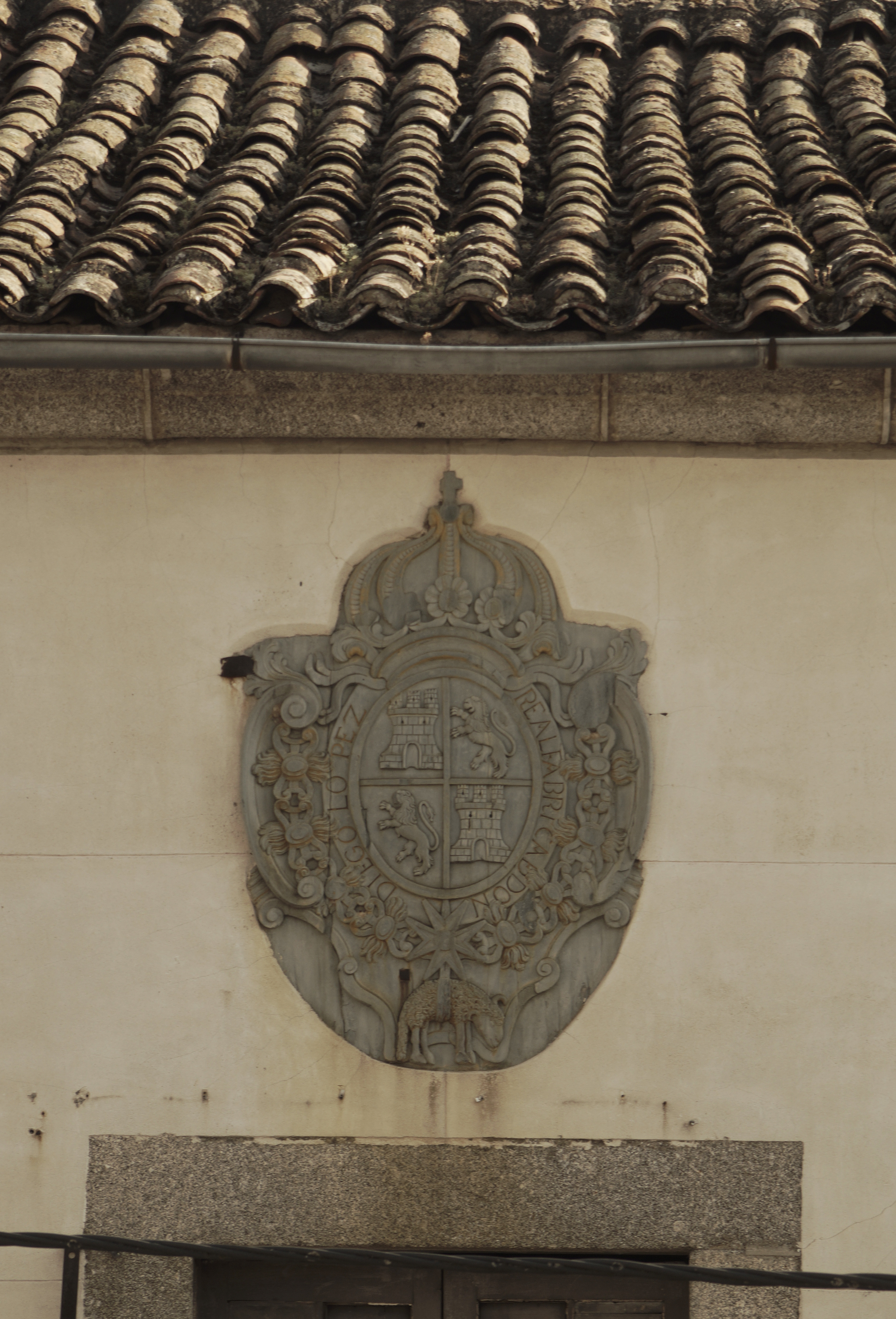 Toisón con la inscripción Real Fábrica de Diego López en la fachada de la misma